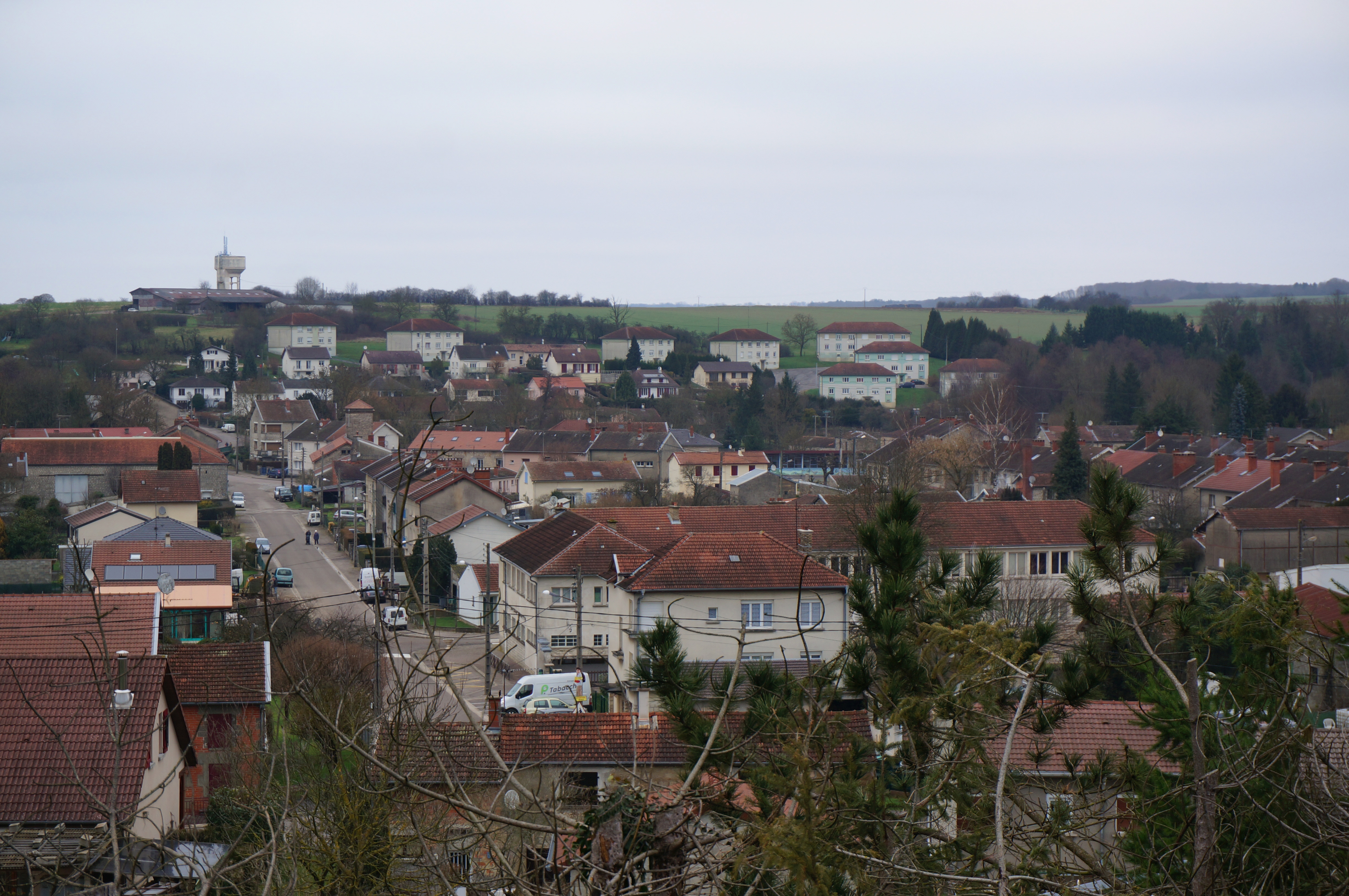 Vues de Robert-Espagne.